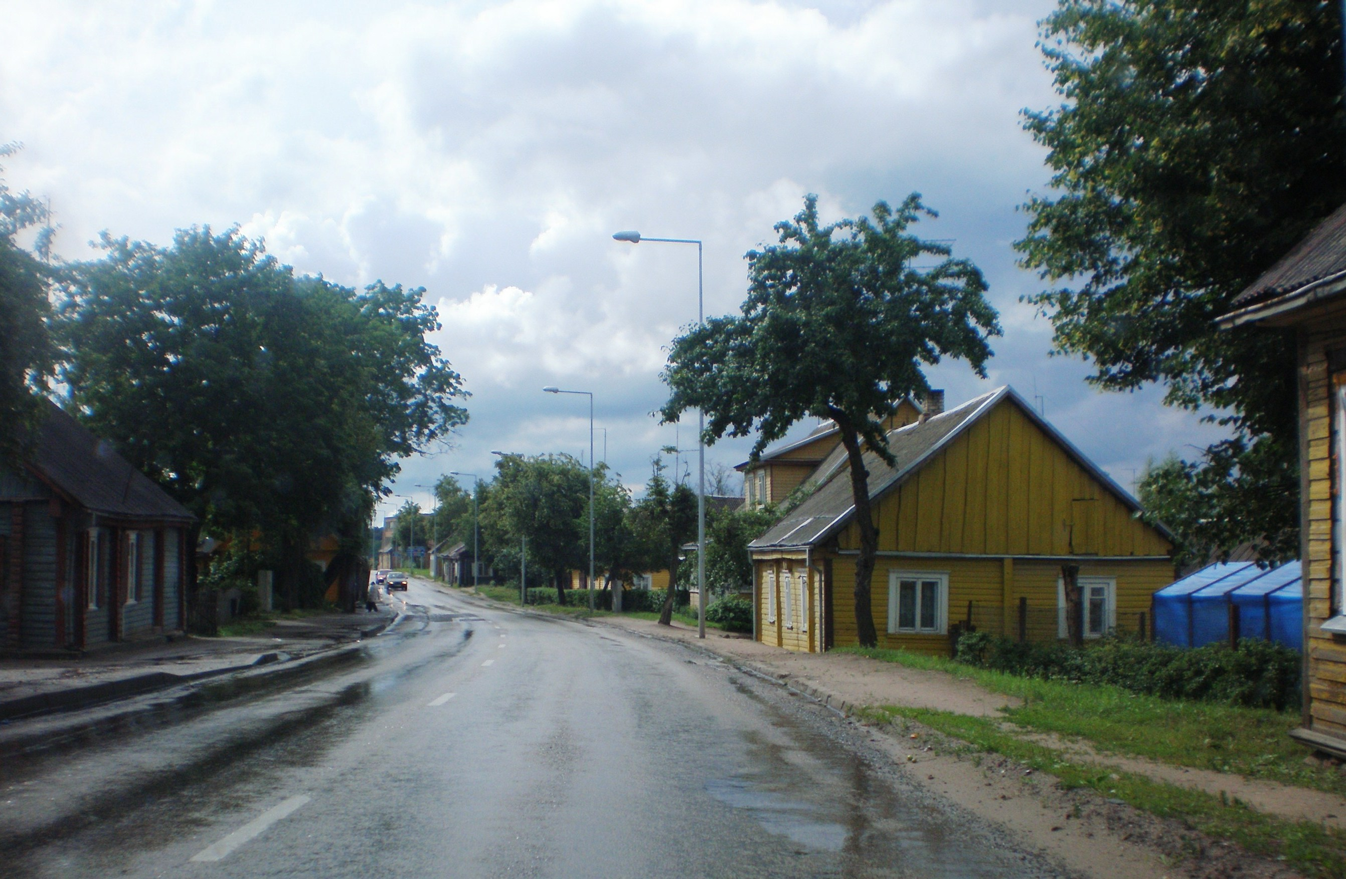 Antakalnio street in Ukmergė city, Lithuania